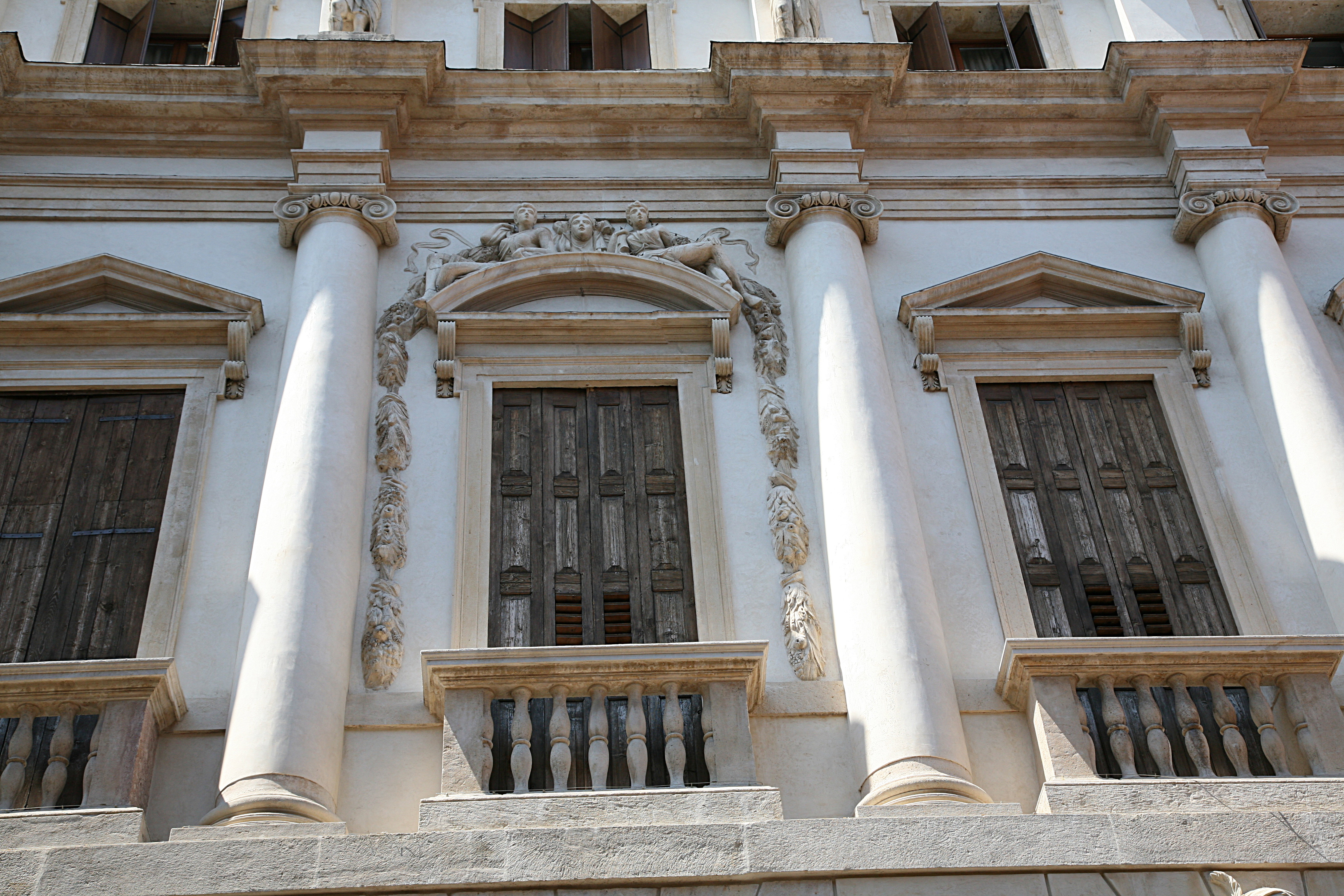 Palazzo Porto in Vicenza